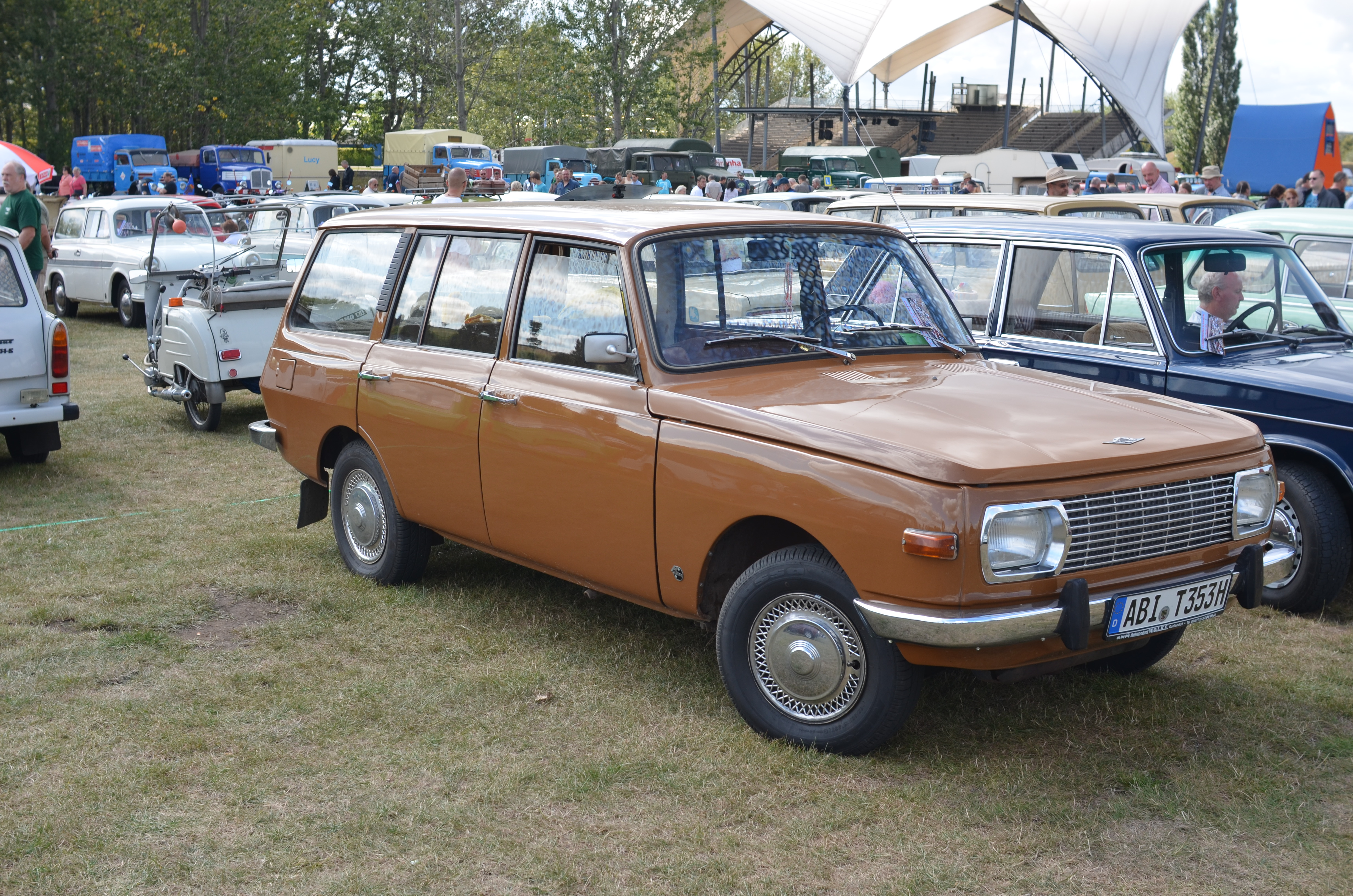 Wartburg